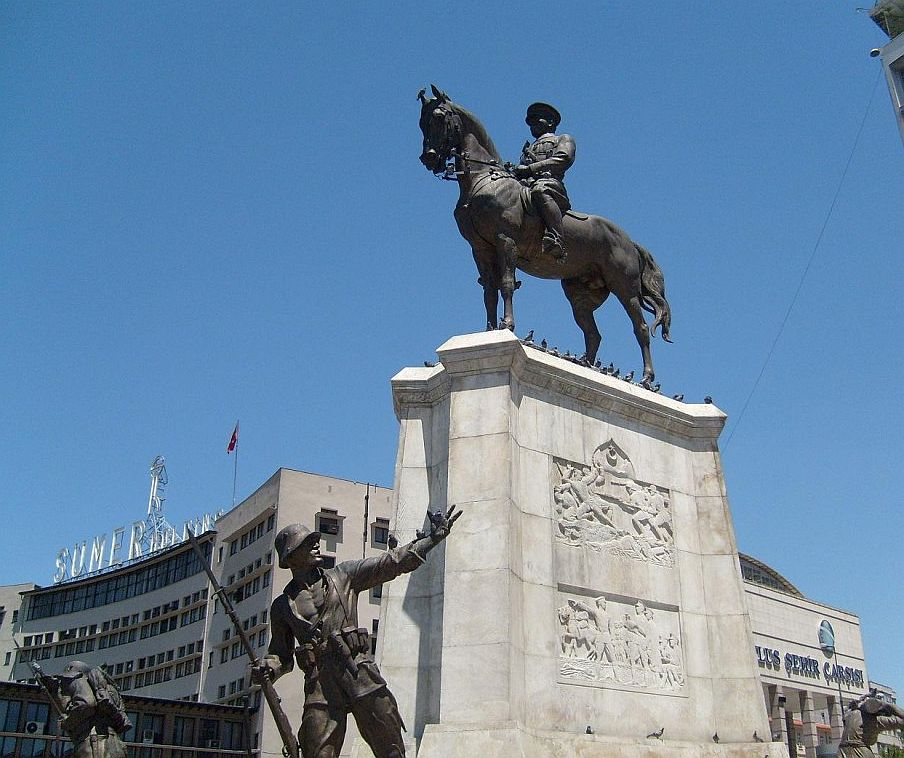 Ankara Ulus Meydanı'ndaki Zafer Anıtı